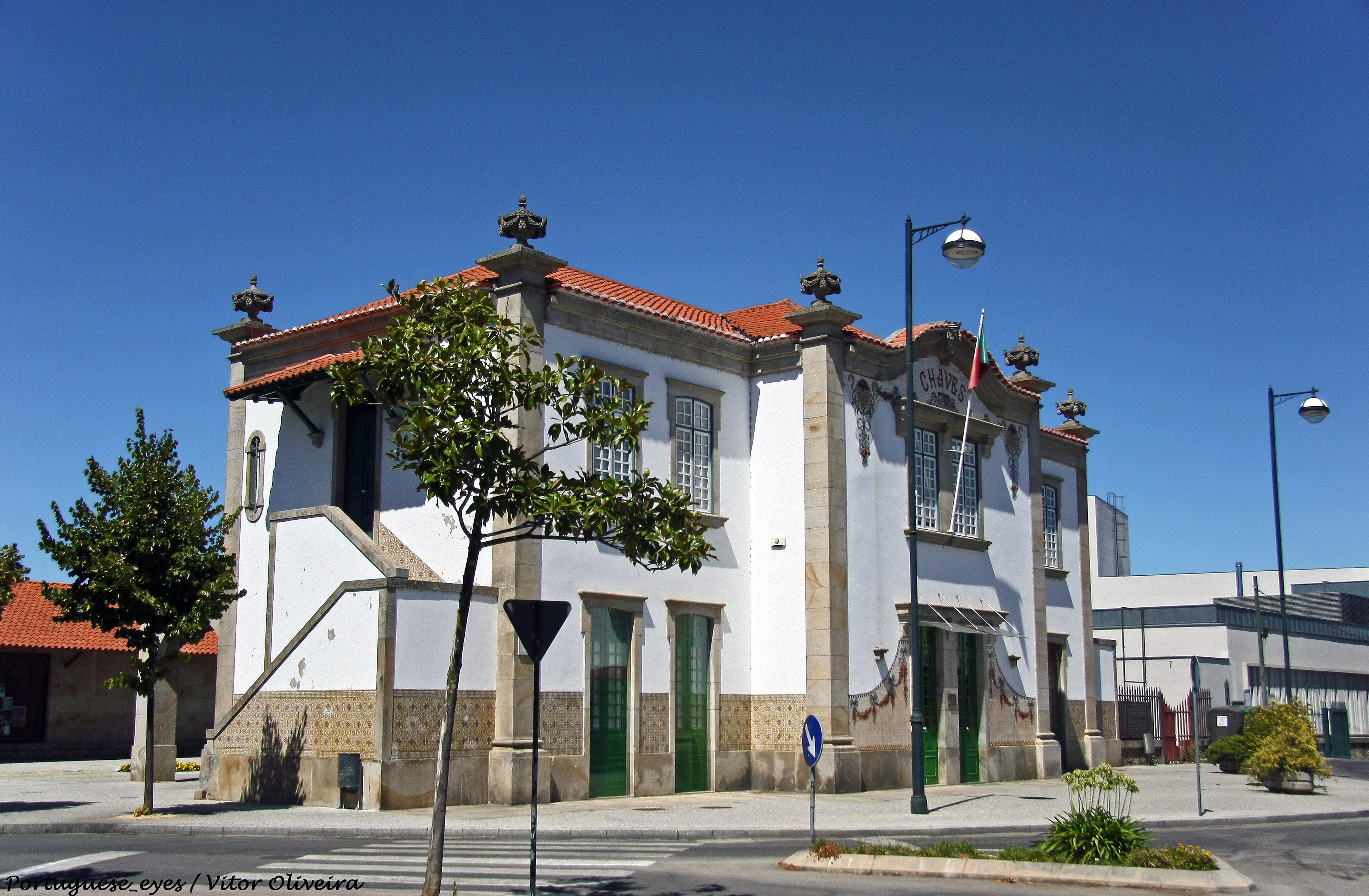 Antiga Estação Ferroviária de Chaves - Portugal